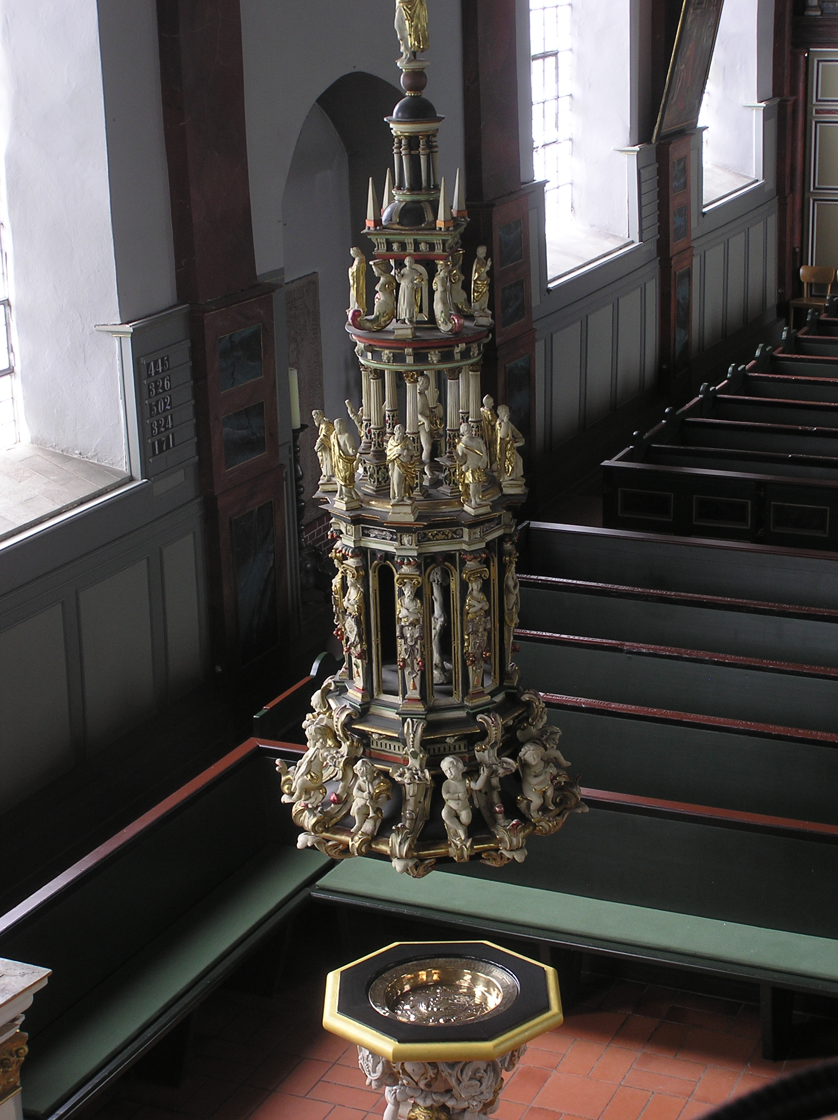 St. Pankratius, Neuenfelde